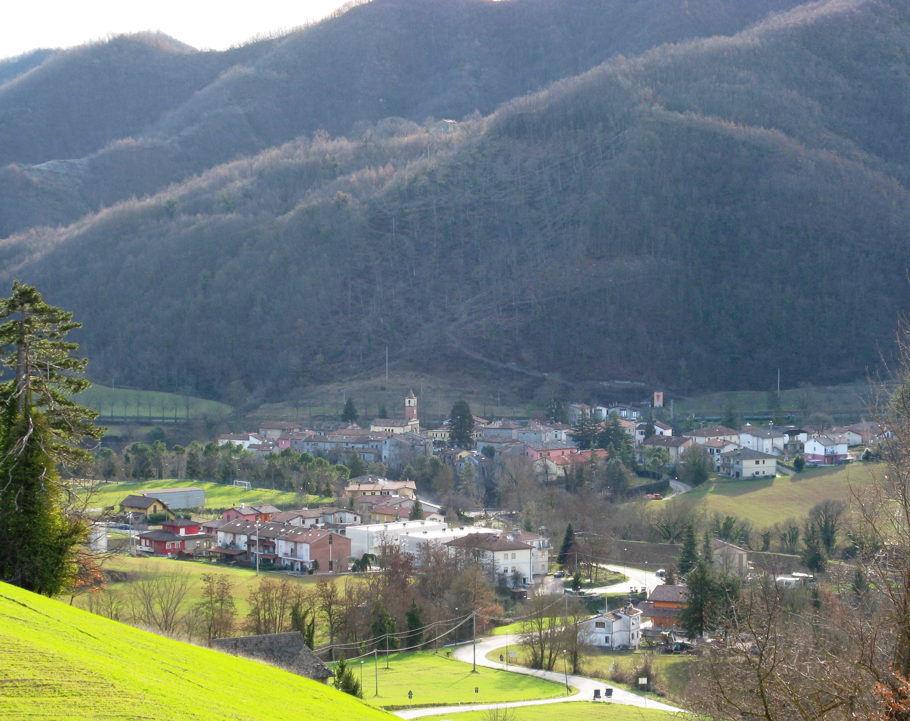 Panorama di Borgo Pace.